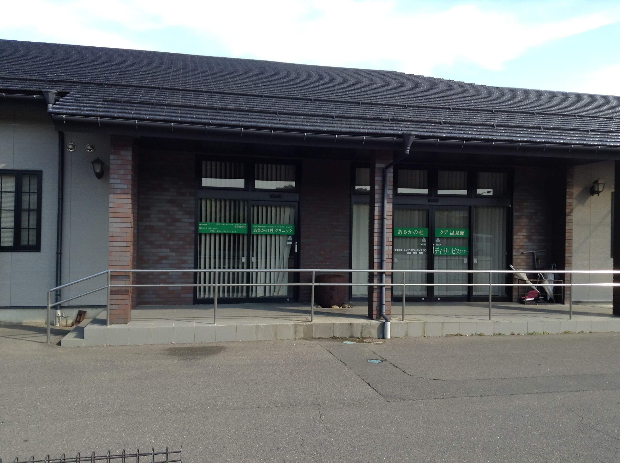 福島県郡山市の安積野温泉